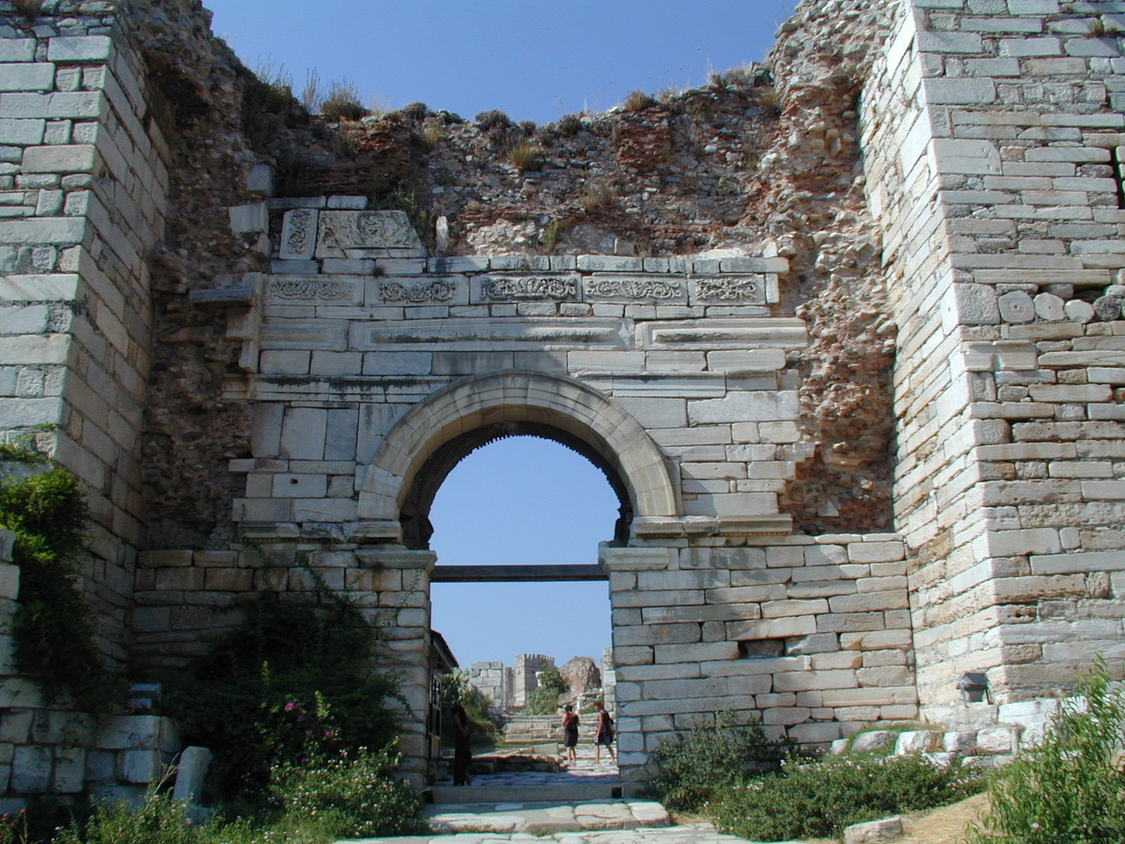 Porte des Persécutions, enceinte de Saint-Jean/Ayasoluk à Éphèse